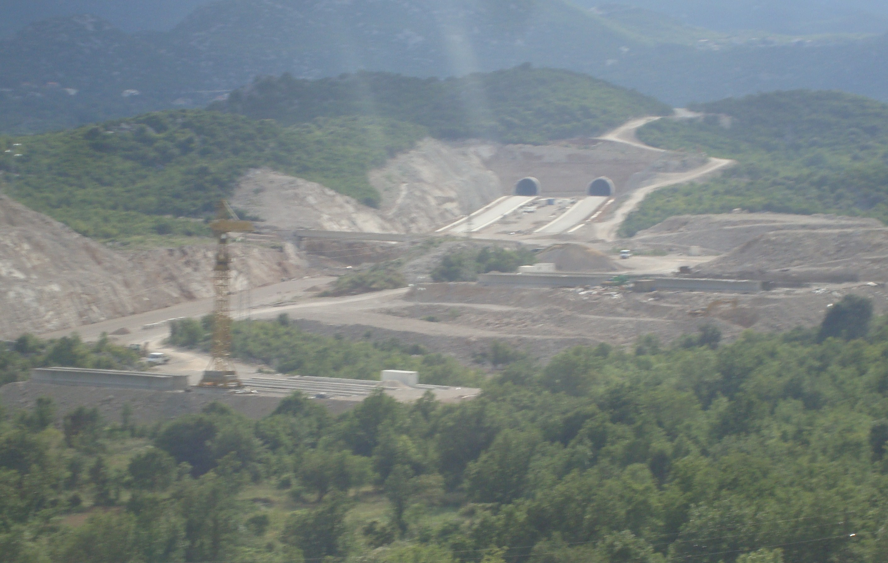 Travaux de prolongement de l'autoroute A1 en Croatie près de Vrgorak.